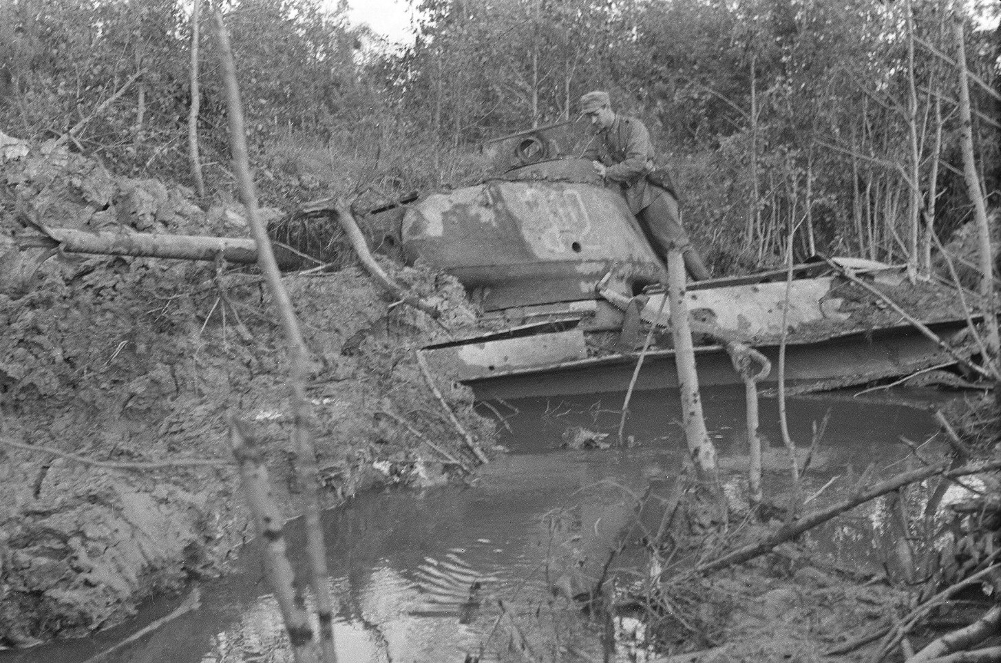 Tuhottu puna-armeijan panssarivaunu.